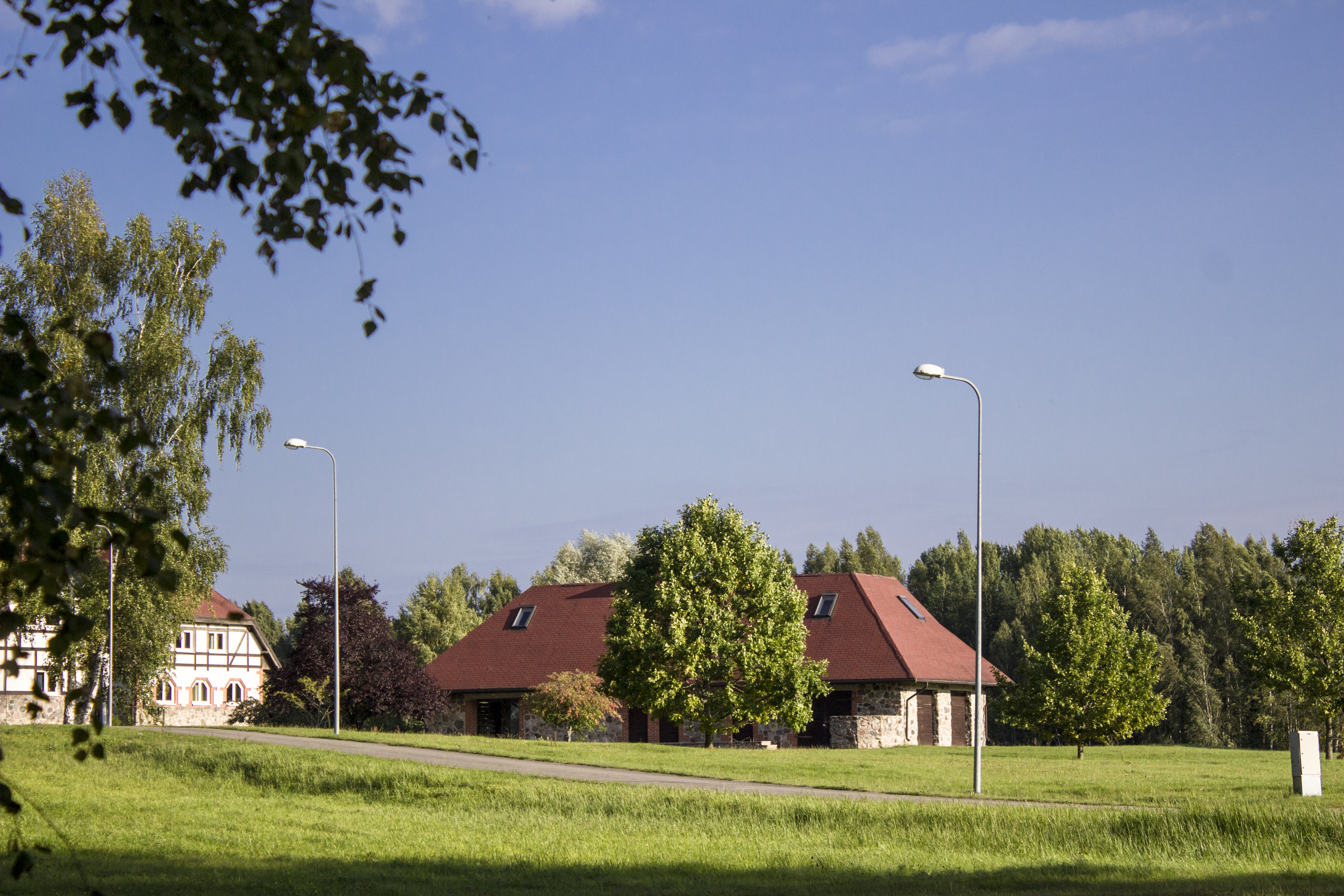 Lejastiezumi